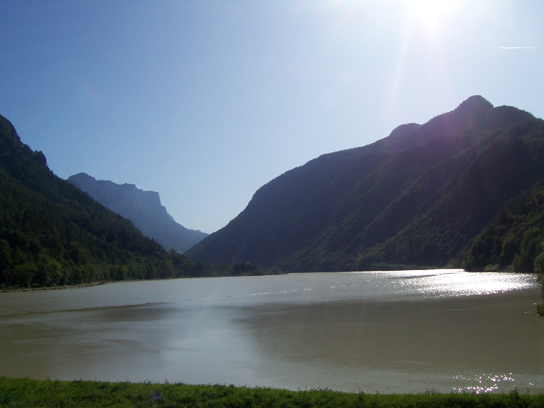 Der Saalachsee von Kibling aus gesehen Bei Verwendung bitte ich hier um einen Hinweis, wo das Foto genutzt wird.